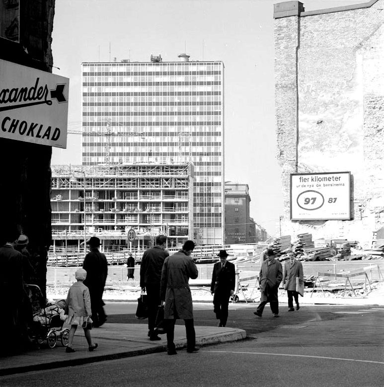 Malmskillnadsgatan - Hamngatan: Första höghuset i fonden. Brandgavel i kvarteret Hästryggen.